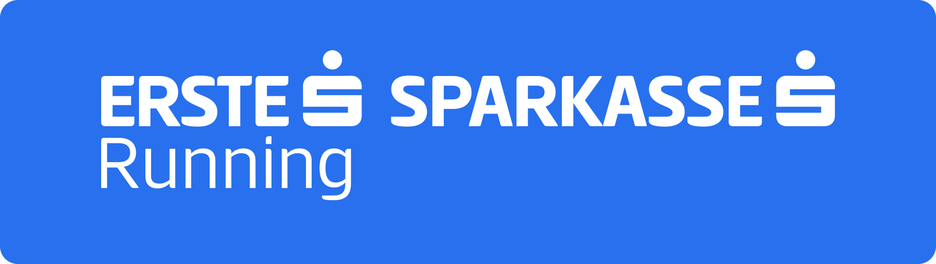 Logo